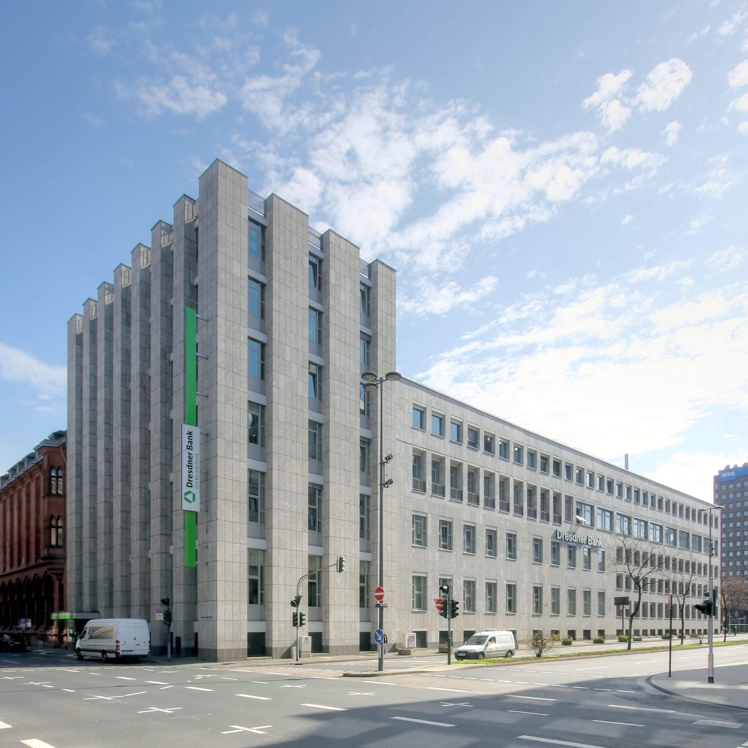 Gebäude der Dresdner Bank, Unter Sachsenhausen 5-7, Köln. Ecke Tunisstraße (Teil der Nord-Süd-Fahrt). Architekt: Wilhelm Riphahn. Baujahr: 1960/61